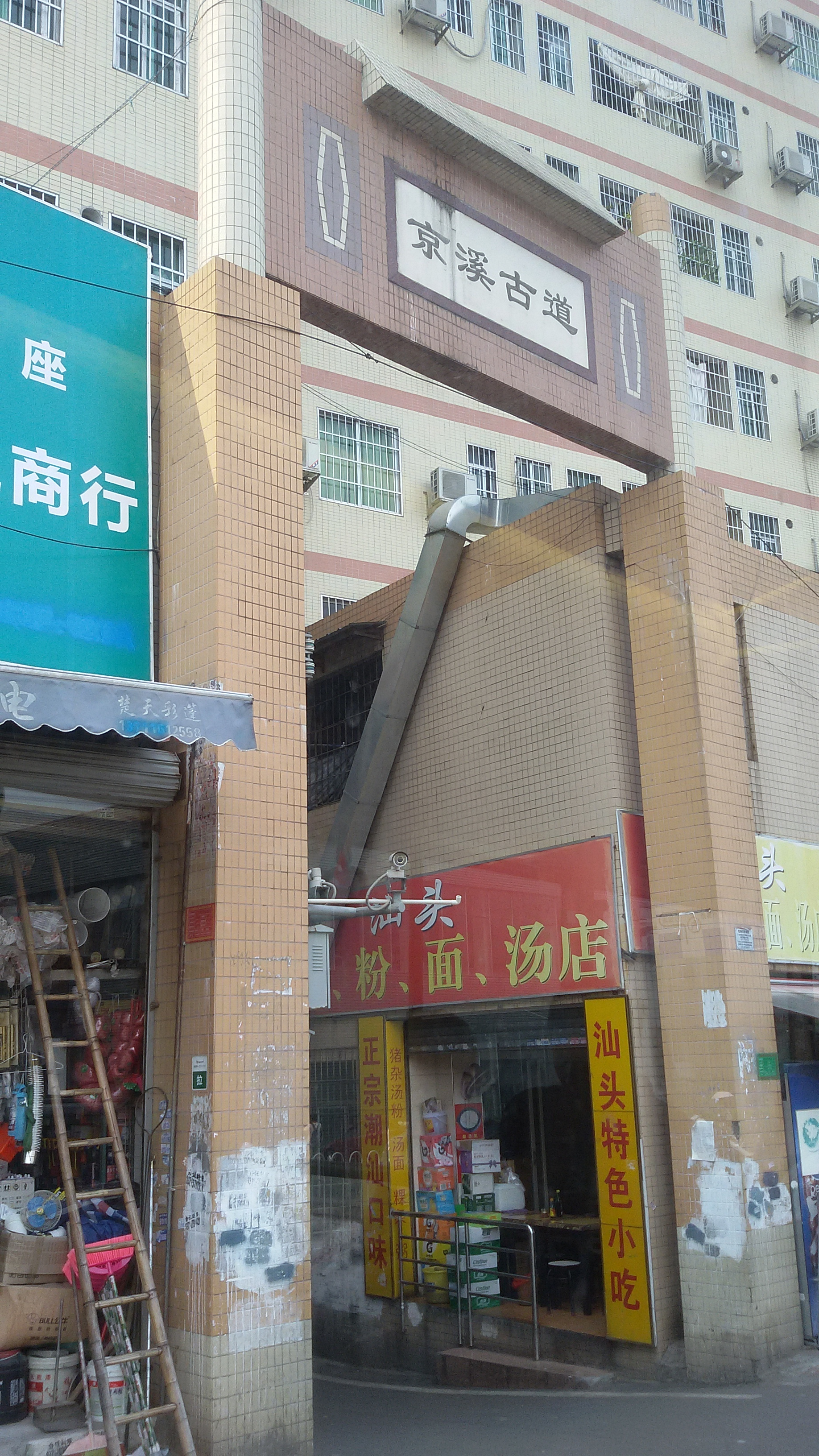 粵語: 京溪古道嘅東牌坊